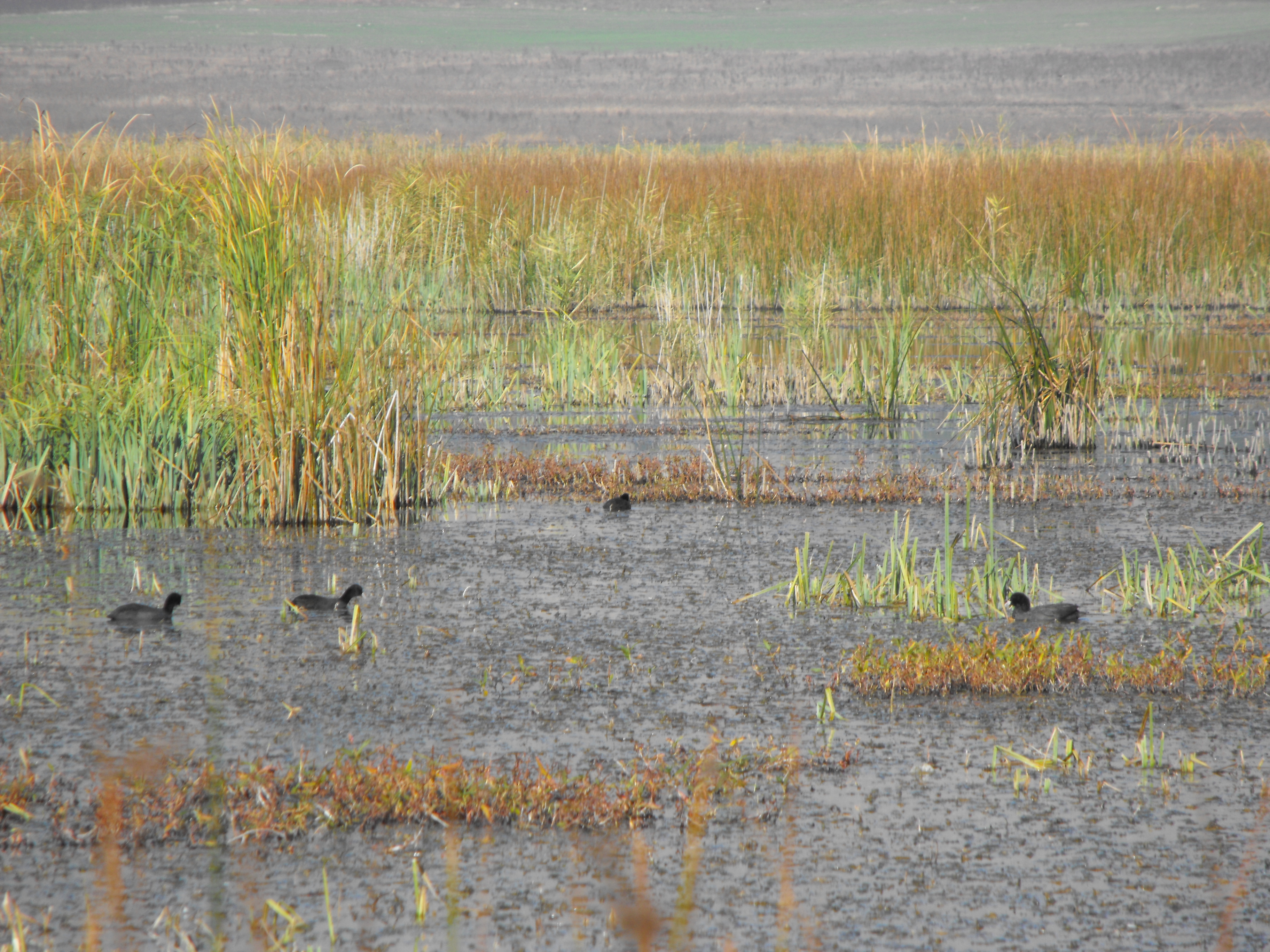 Aldomirovtsi marsh, Bulgaria (Алдомировско блато)